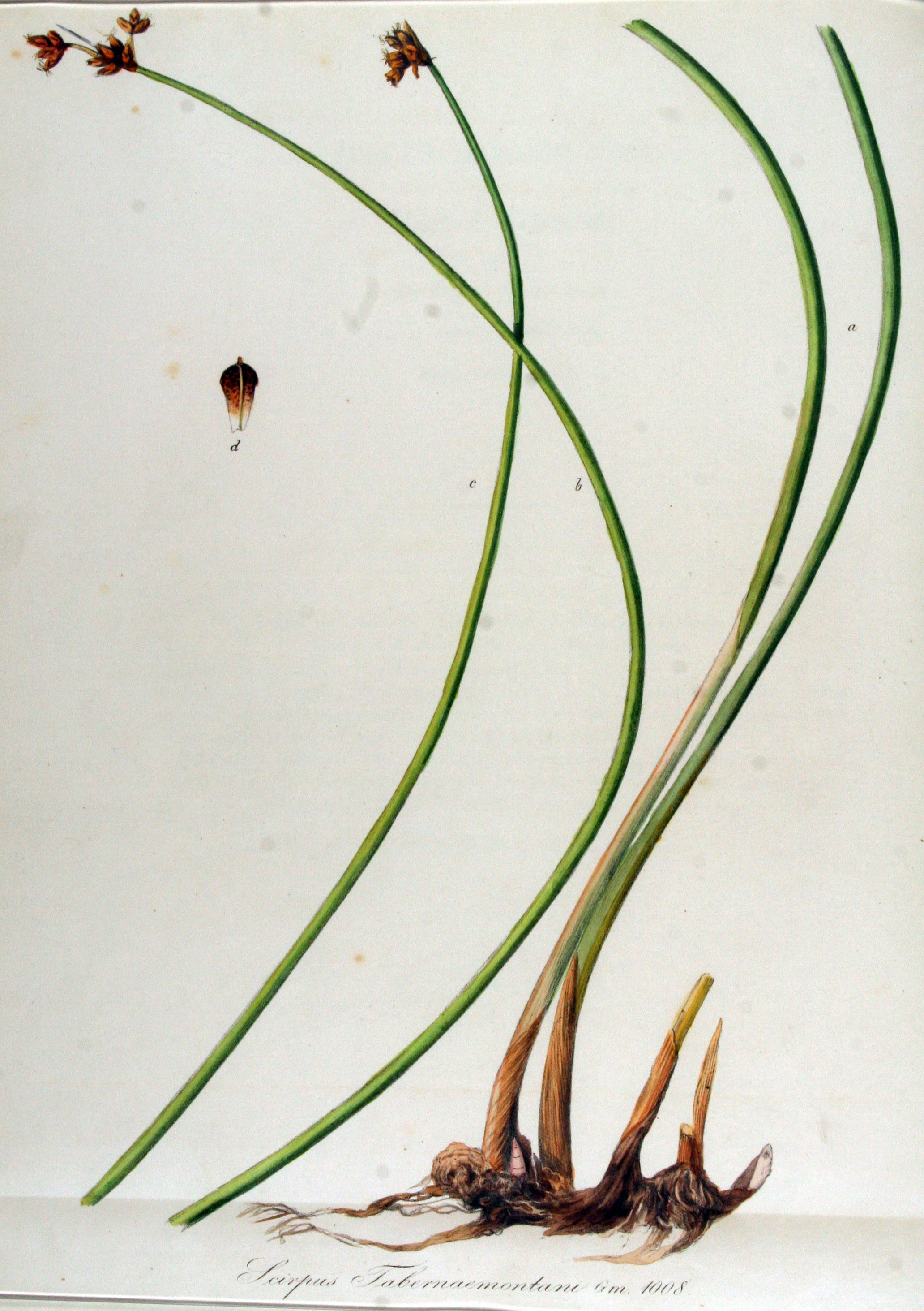 Schoenoplectus tabernaemontani (C.C. Gmel.) Palla (Syn. Scirpus tabernaemontani C.C. Gmel.)